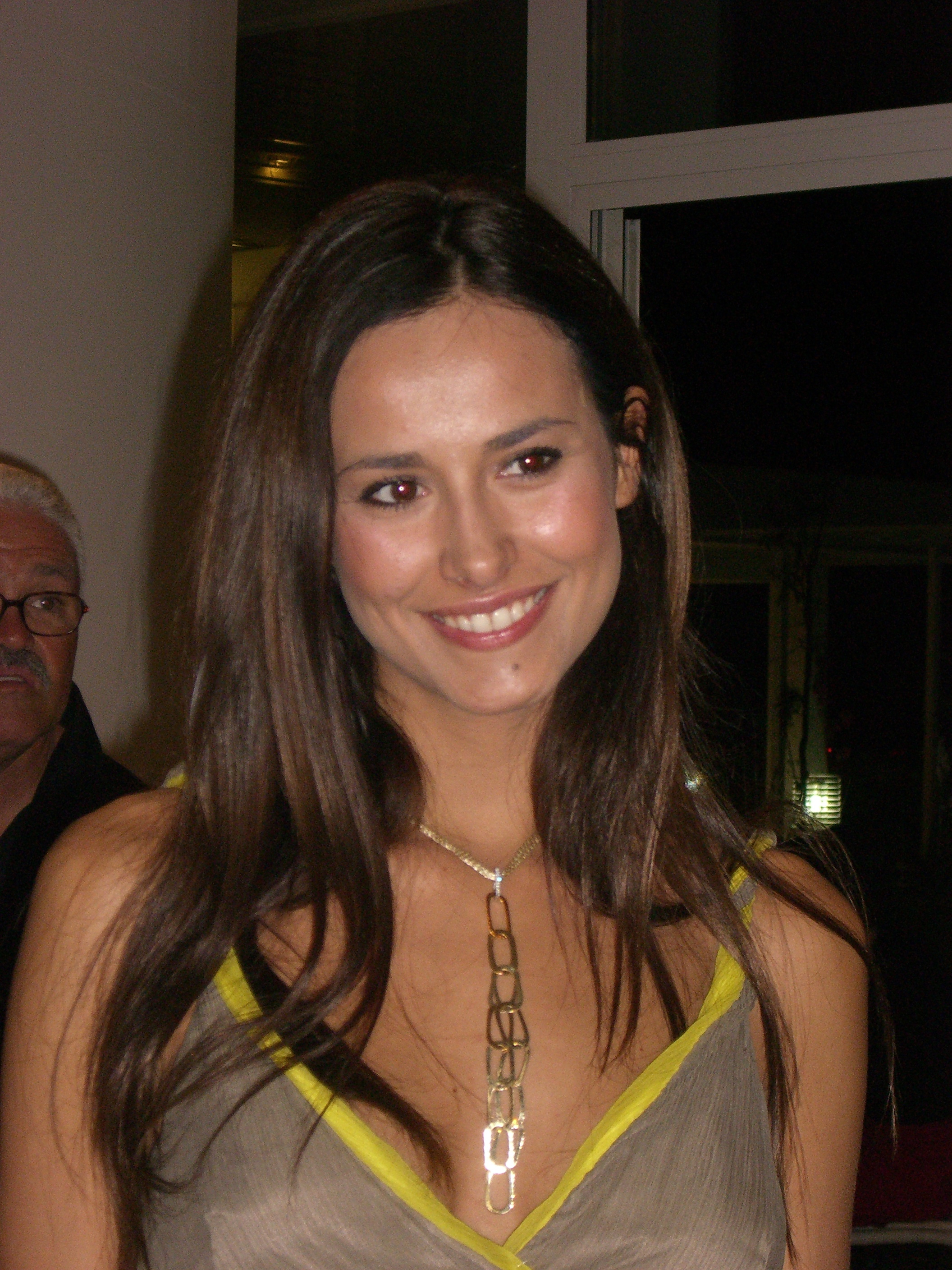 La show girl e conduttrice televisiva italiana Michela Coppa